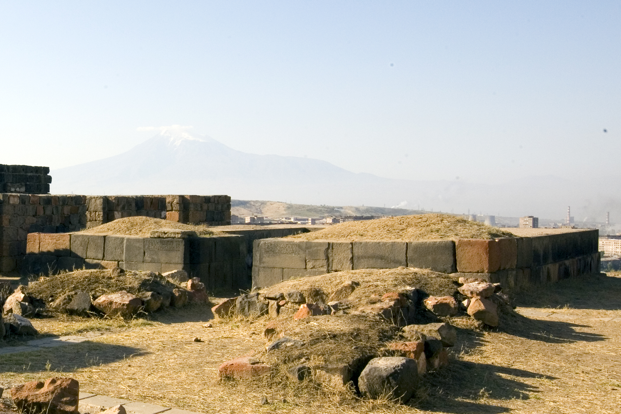 Urartian Susi Temple in Erebuni